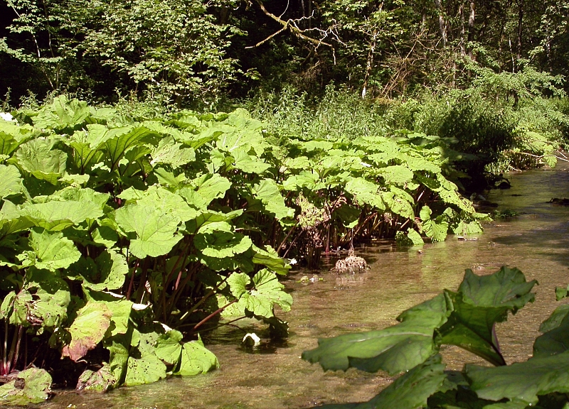 Stand of Petasites hybridus - Wutachschlucht, Schwarzwald, Deutschland, Germany